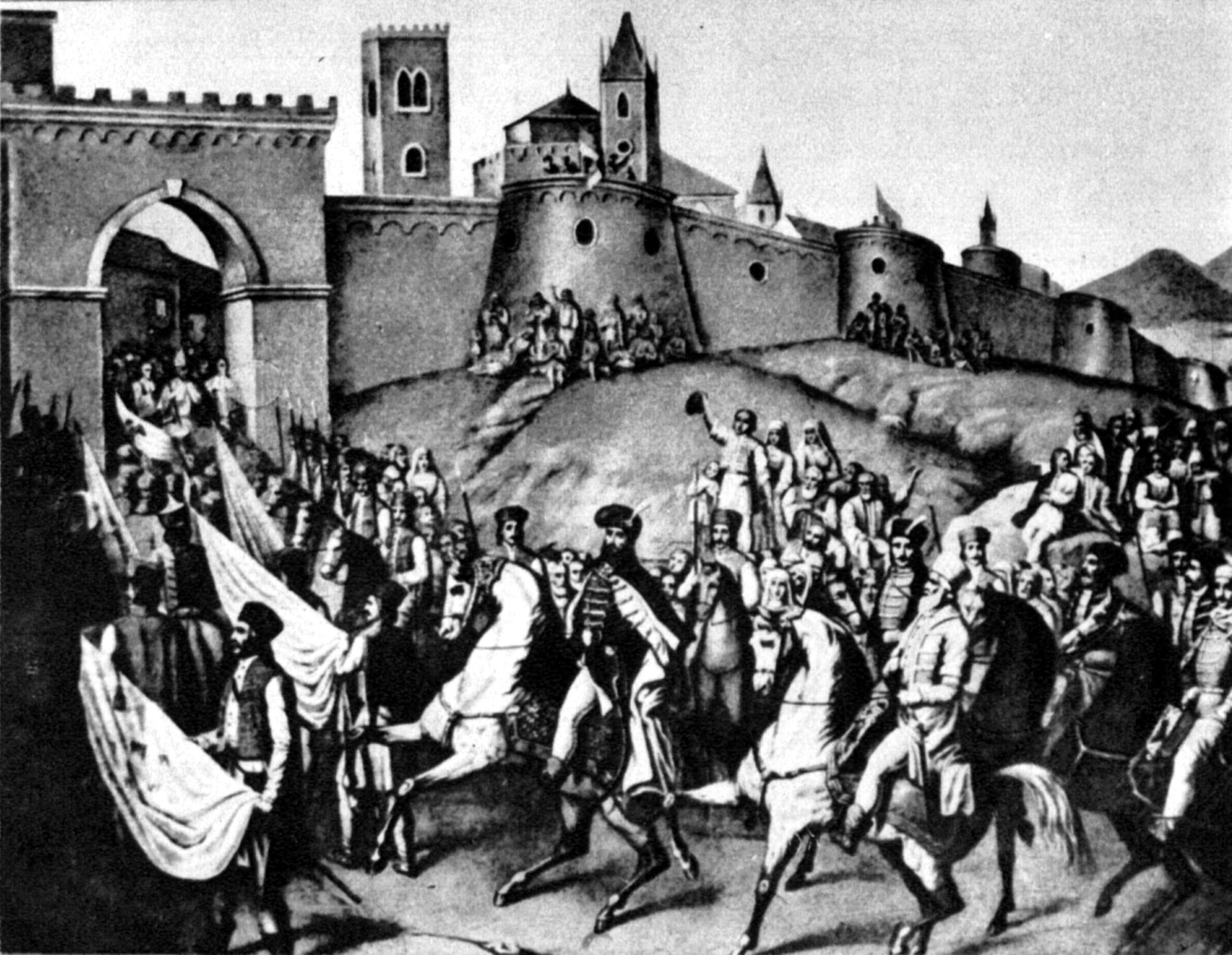 Mihai Viteazul entering Alba Iulia